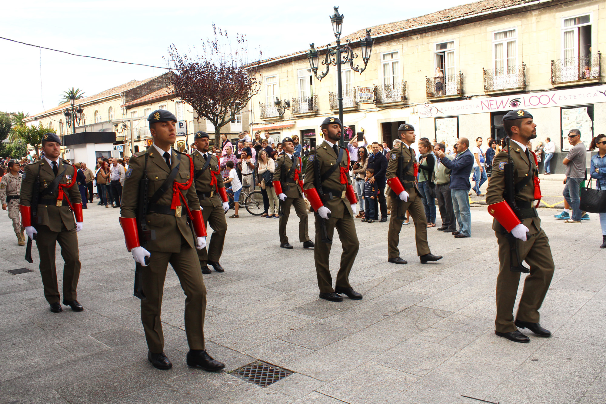 Tuy / Jura de Bandera para civiles Jura de Bandera para civiles celebrada en Tuy, Pontevedra (España), el 5 de octubre de 2014, con la presencia de efectivos del Regimiento de Infantería Ligera "Isabel la Católica" Nº 29, encuadrado en la Brigada de Infantería Ligera Aerotransportable "Galicia" VII (BRILAT), con sede en Figueirido, Pontevedra. Tuy / Pledge of Allegiance for civilians Pledge of Allegiance to civilians held in Tuy, Pontevedra (Spain), on October 5, 2014, with the presence of troops from Light Infantry Regiment "Isabel La Católica" No. 29, framed in the Airborne Light Infantry Brigade "Galicia" VII (BRILAT), located Figueirido, Pontevedra.